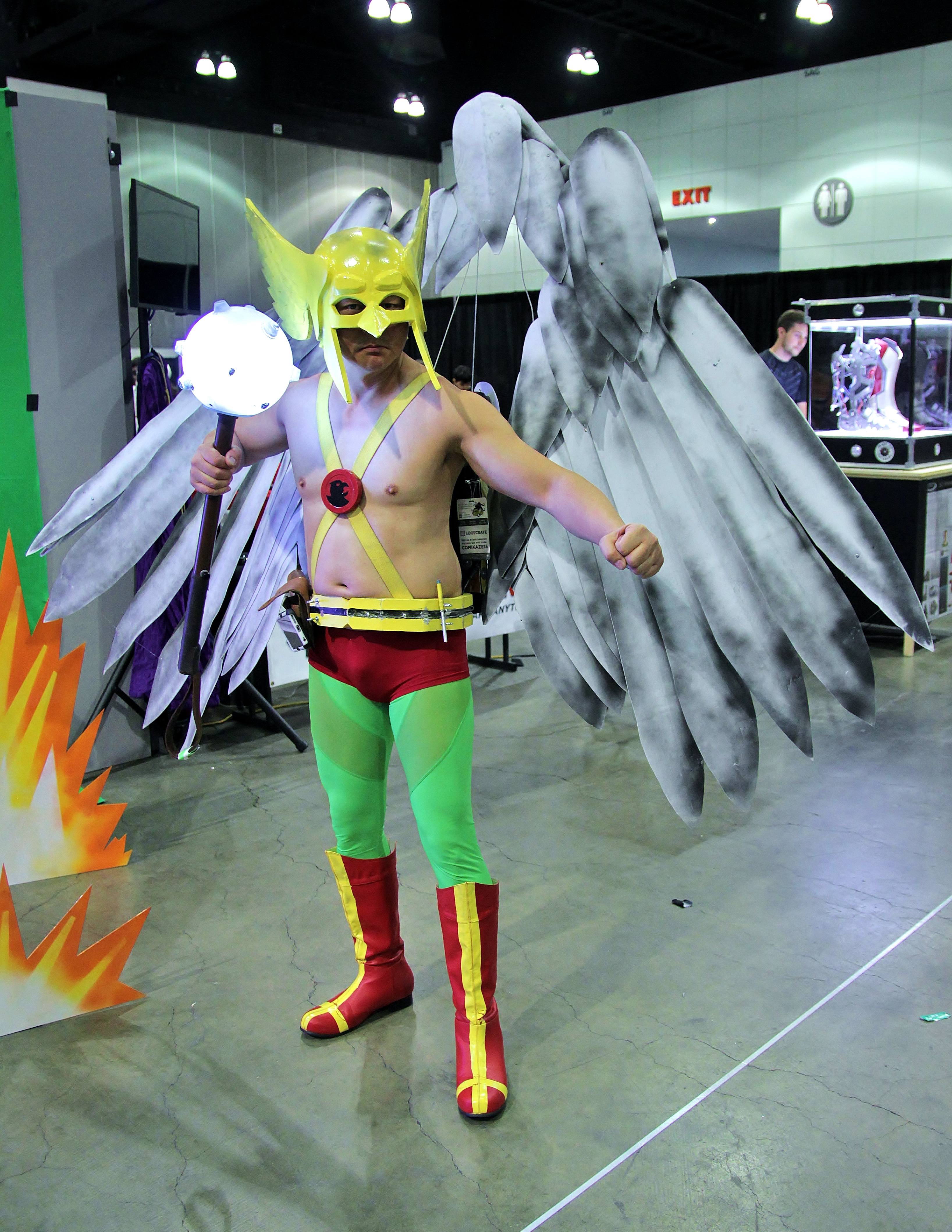 Cosplay at Comikaze Expo 2015.